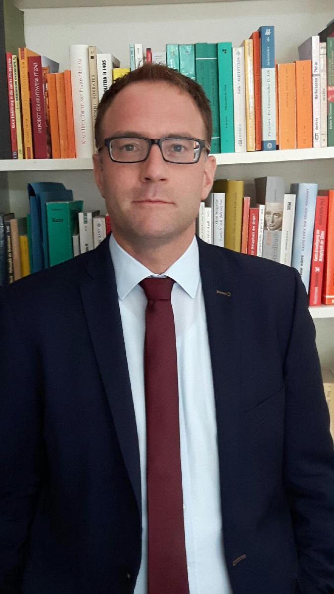 Prof. Dr. Malte Dominik Krüger